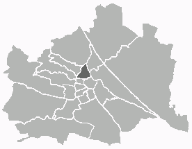 Positionskarte des 9. Wiener Gemeindebezirks Unter Verwendung einer Vorlage von Extrawurst. Public Domain.